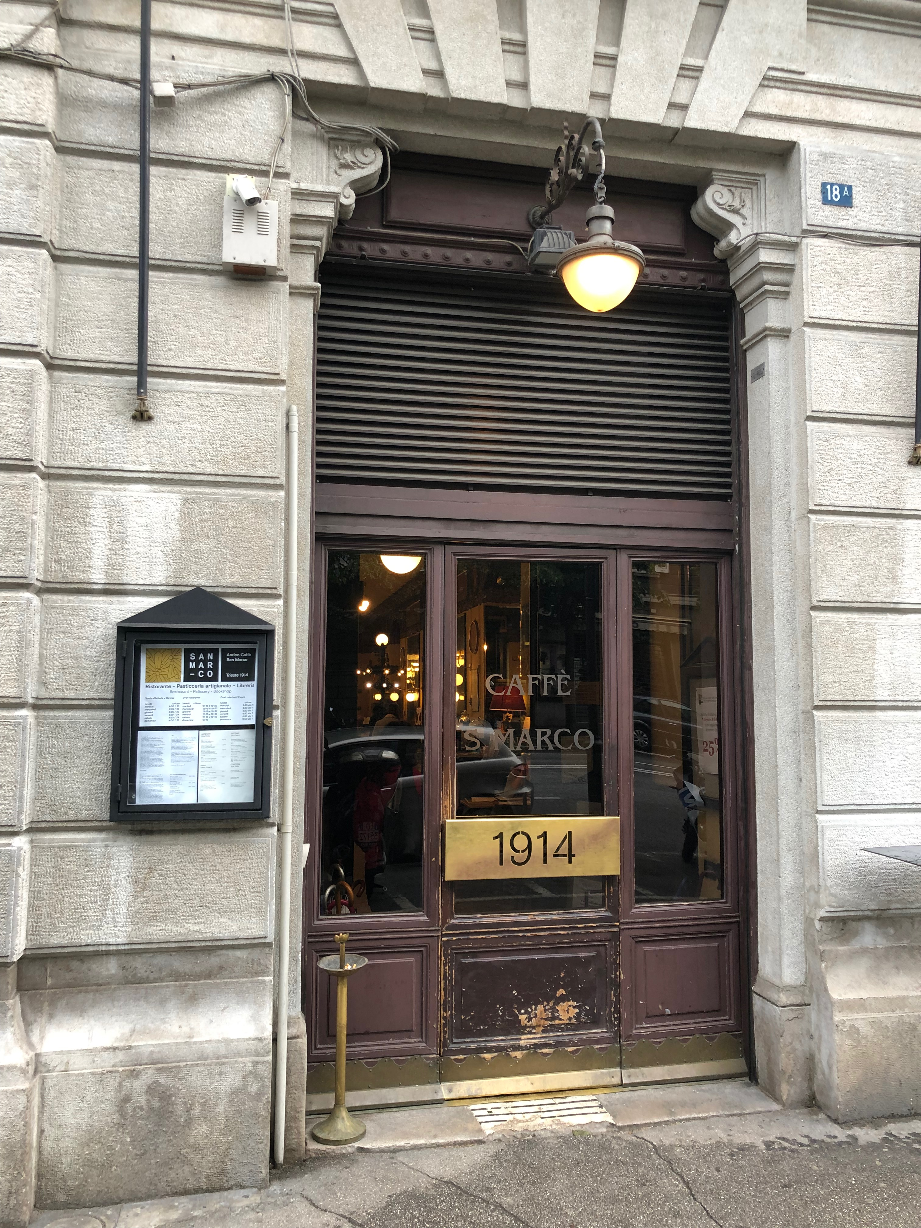 Ingresso Antico Caffè San Marco